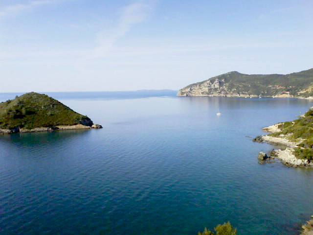 Monte Argentario - costa sud-est con parziale veduta dell'Isolotto